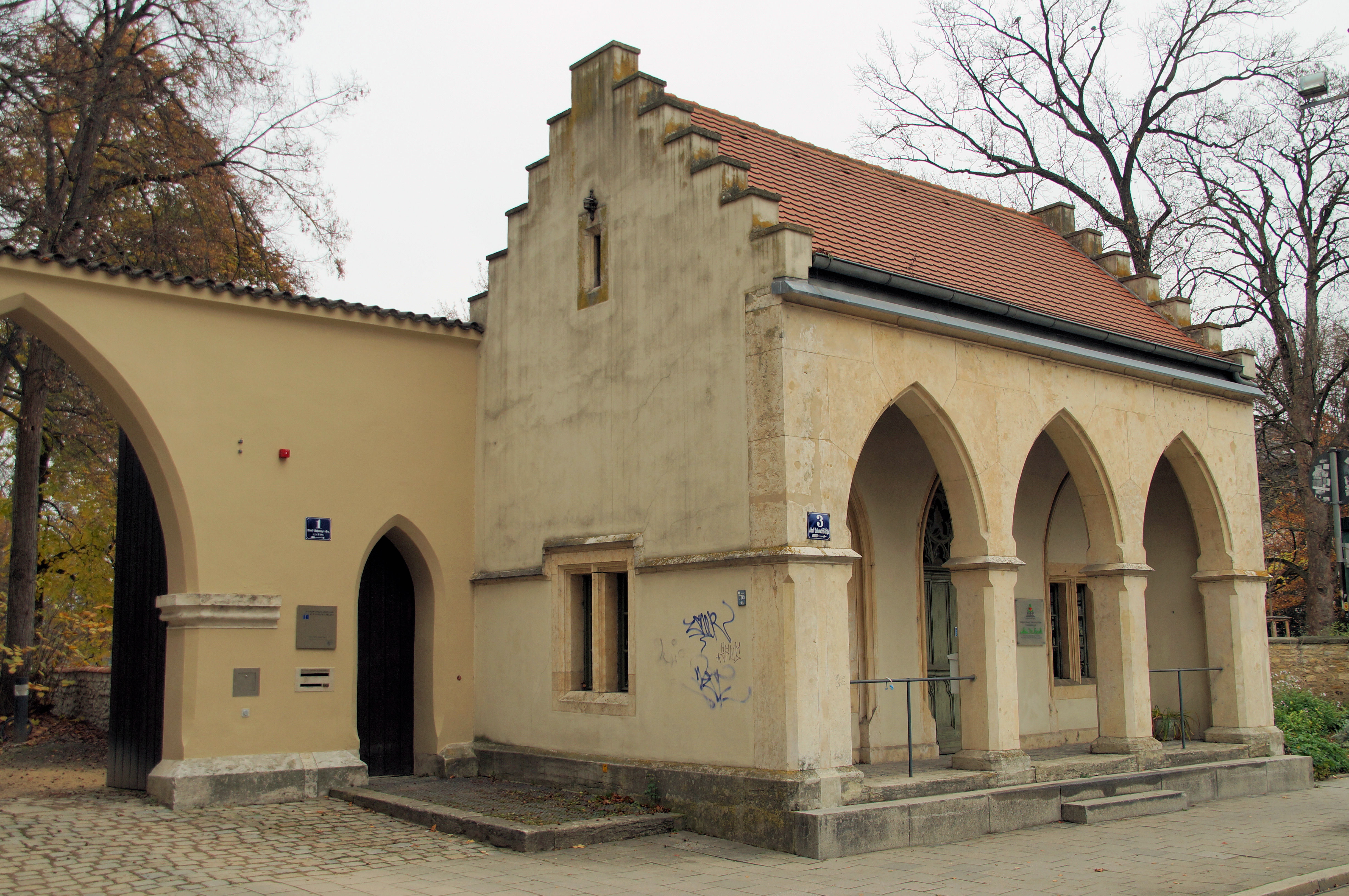 Torwachthaus, eingeschossiges und traufständiges Satteldachhaus mit Treppengiebeln und Arkaden, Werksteingliederungen, neugotisch, 1840. This is a photograph of an architectural monument.